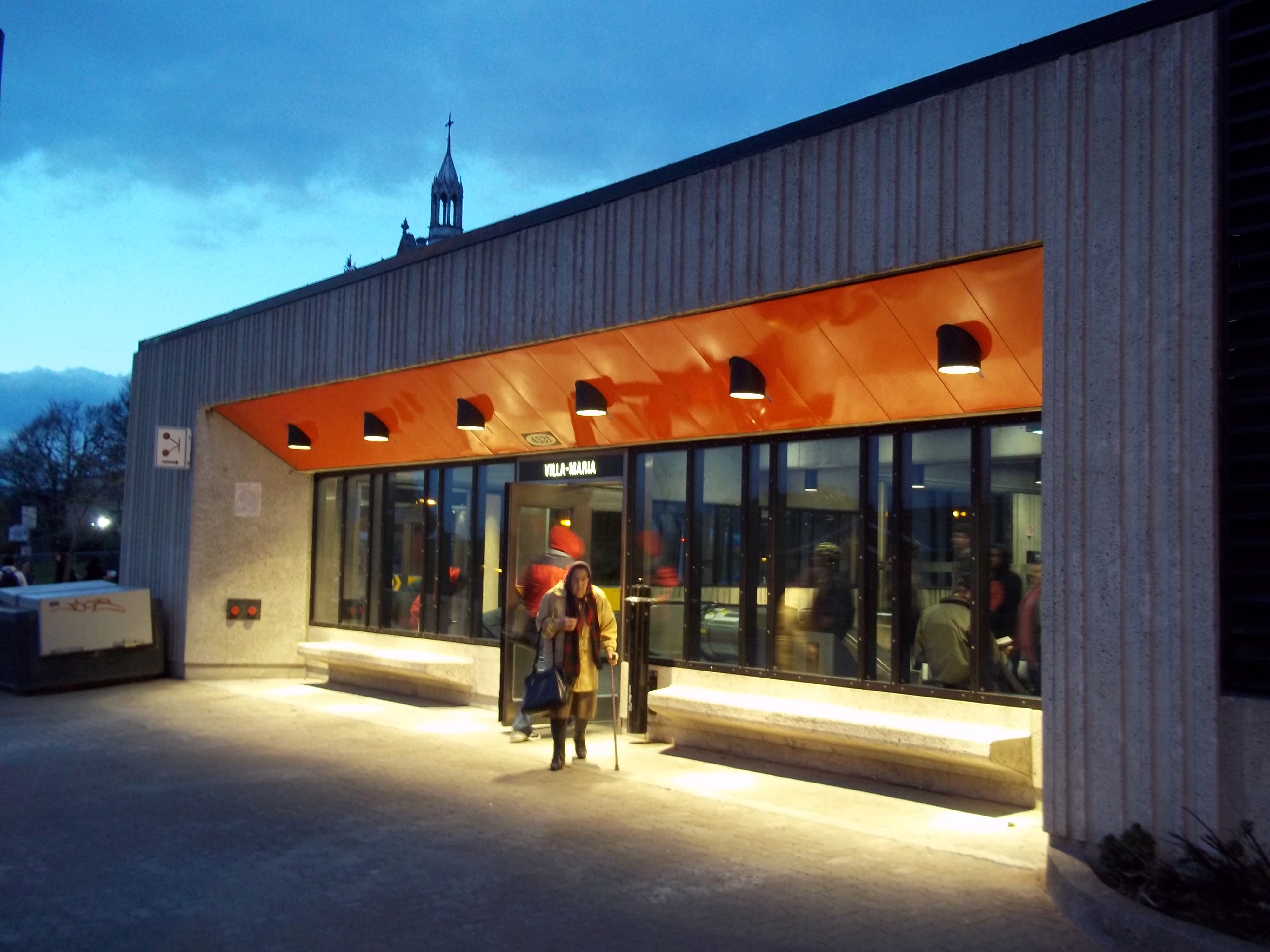 Édicule de la station de métro Villa-Maria, Montréal